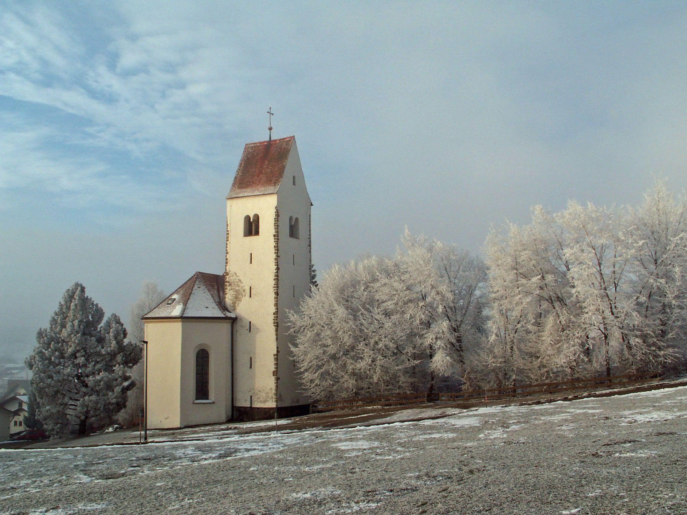 Kirche in Kraftisried im Raureif